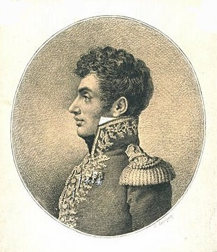 Joseph Christiani (1772-1840), général de brigade et baron de l'Empire.